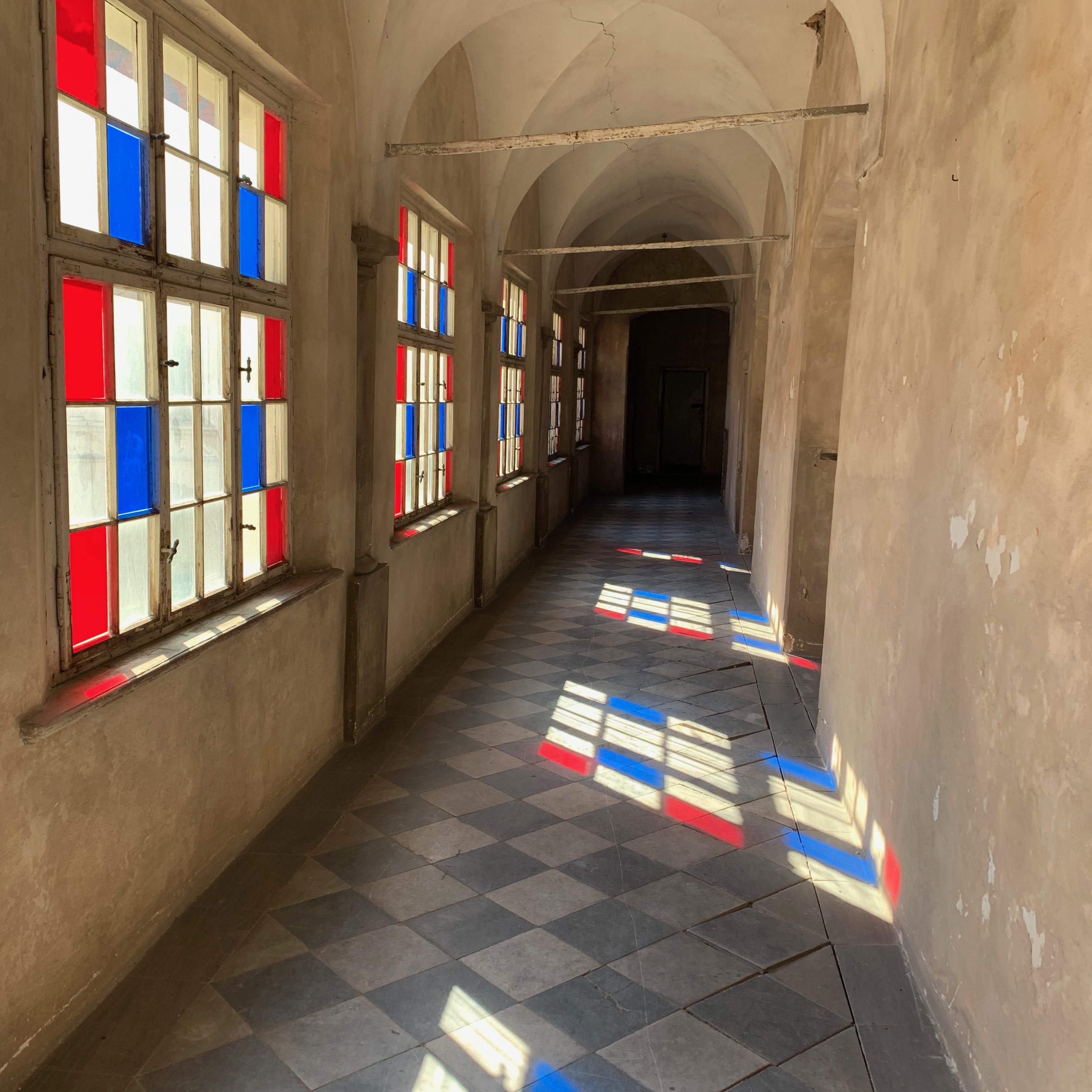 Korytarz 2. kondygnacji, skrzydło frontowe (zachodnie) - dawne krużganki, kolorowe folie to resztki dekoracji na potrzeby filmu "Jasminum"